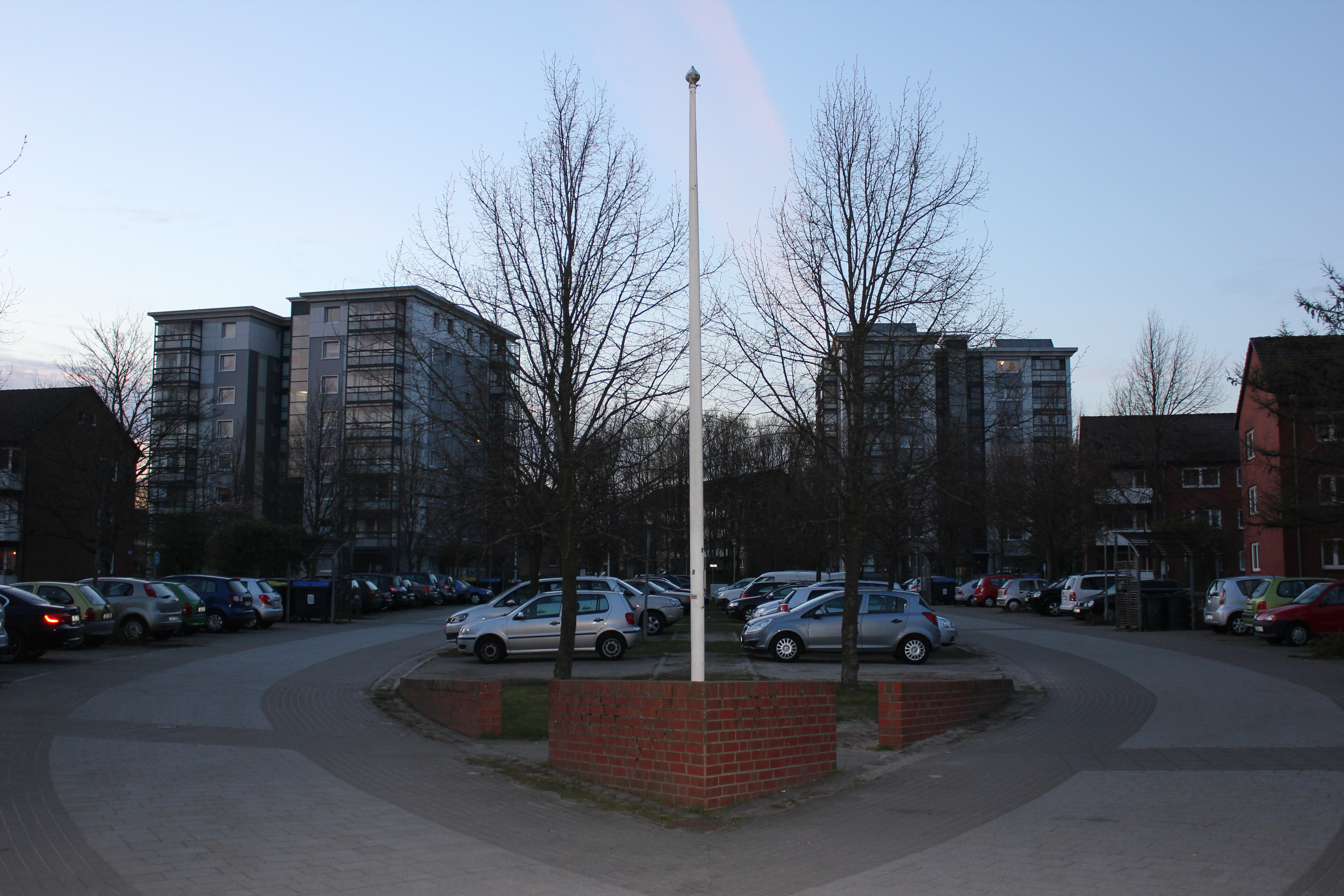 Punkthäuser Franz-Schubert-Hof 20 und 21, Musikerviertel Flensburgs 2014-04-16